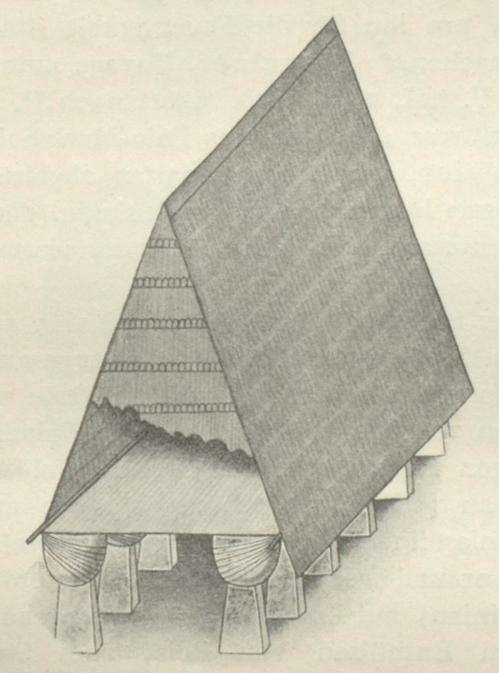 Chamorrohaus Rekonstruktion